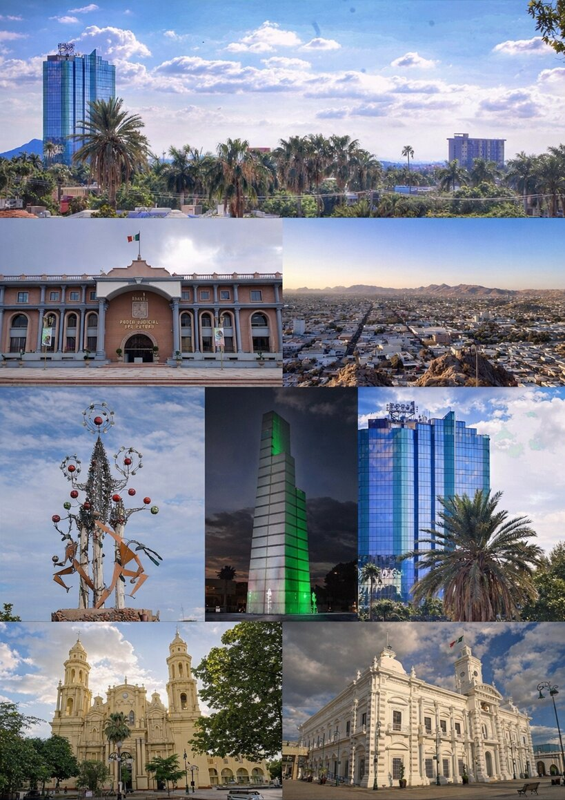 Hermosillo